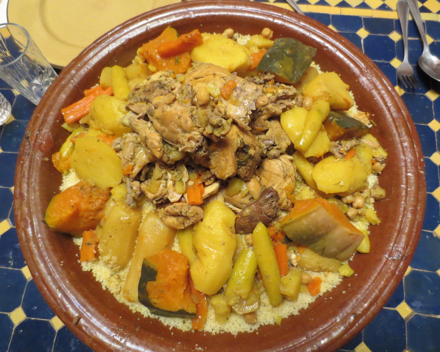 Couscous